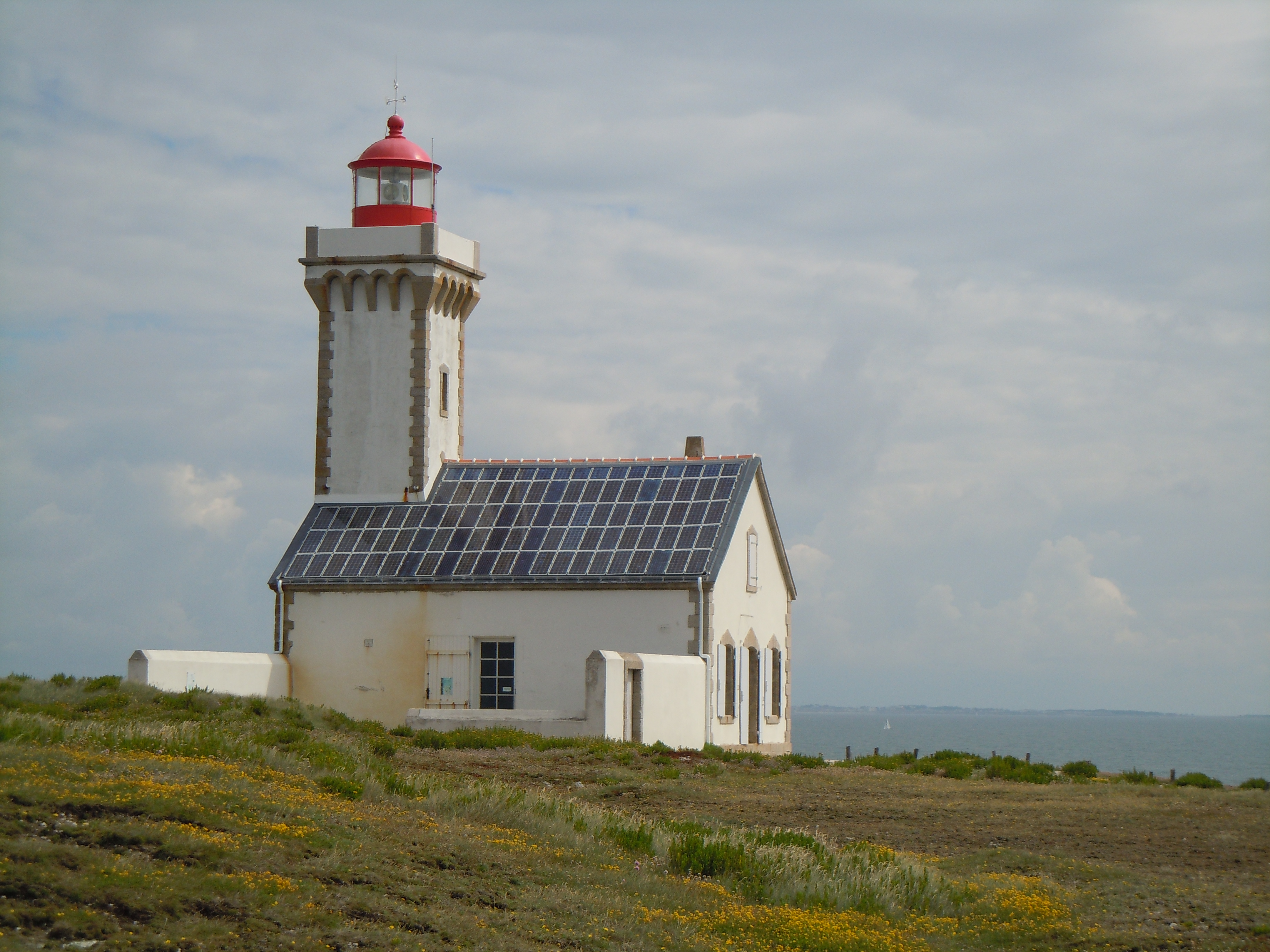 panneaux solaires du Phare des Poulains : 3 kWc